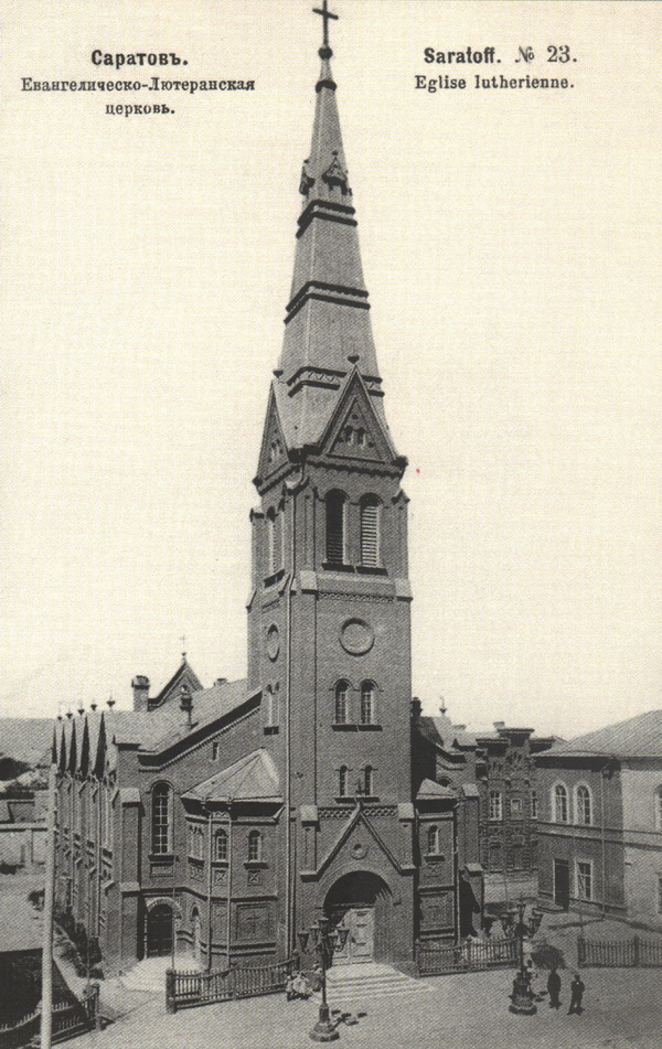 Лютеранская церковь в Саратове. Разрушена в 1935 году